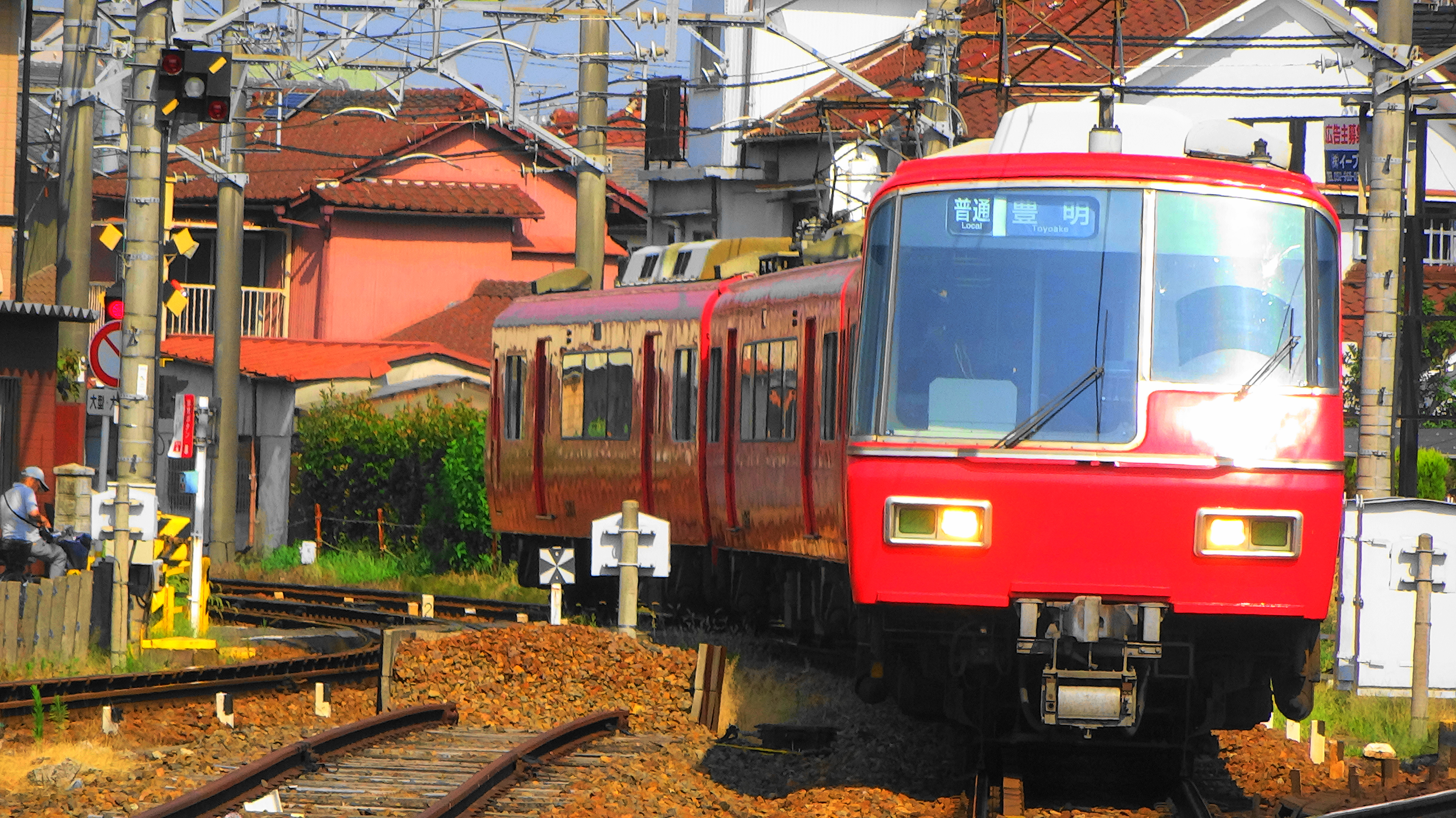 名鉄5700系須ヶ口にて